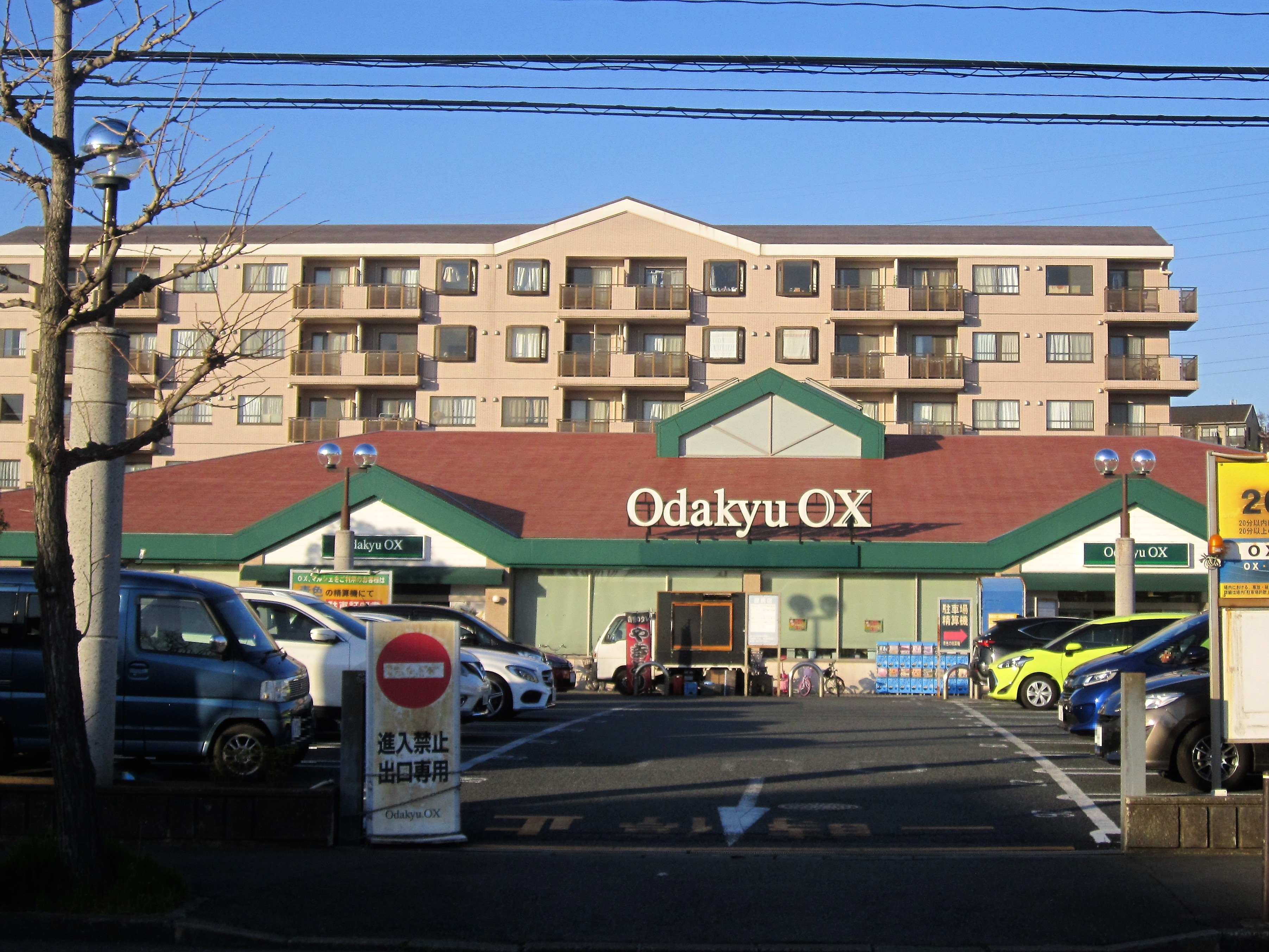 Odakyu OX 栗平店（川崎市麻生区栗平）